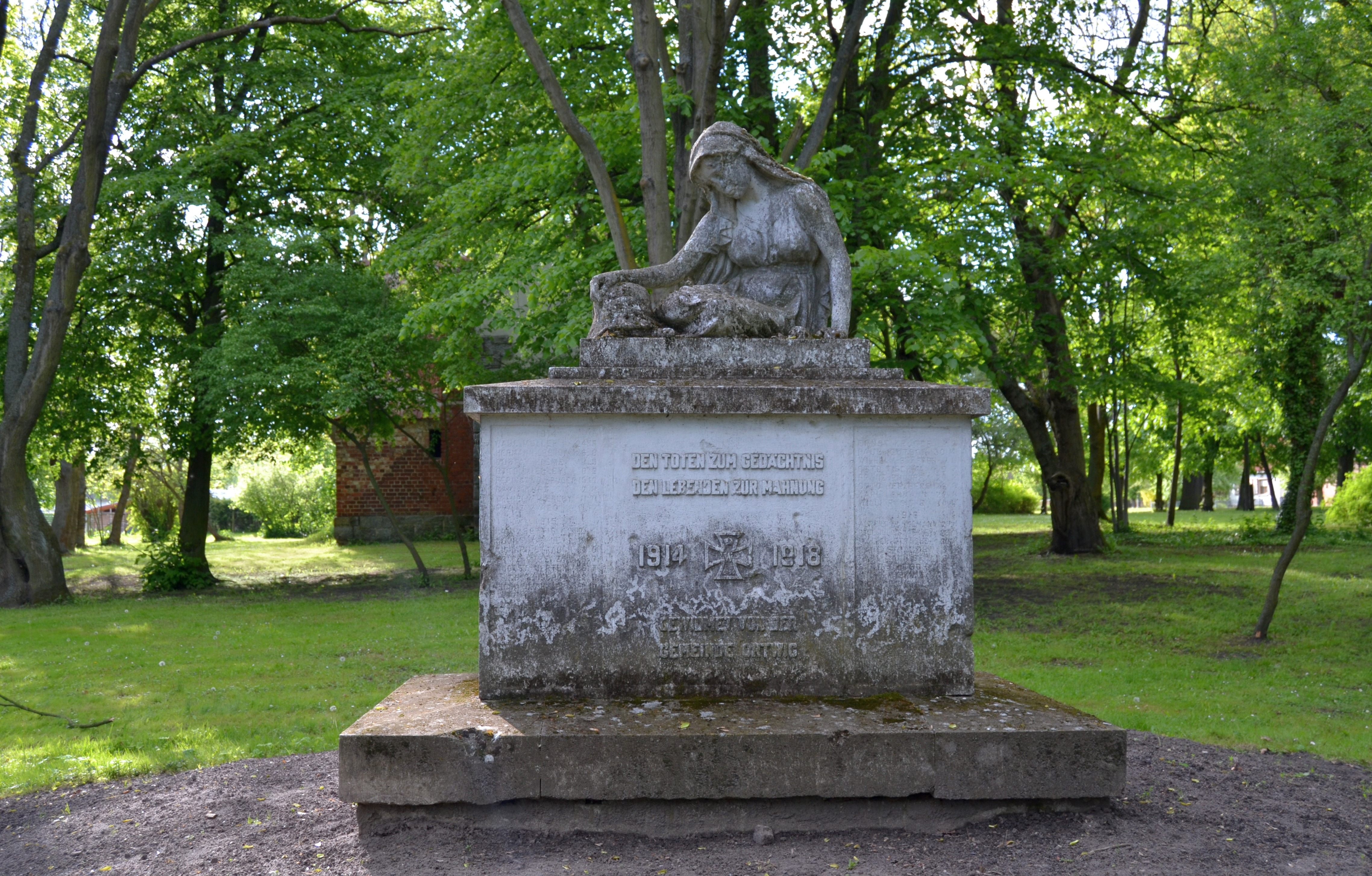 Denkmal für die Opfer des I. Weltkriegs in Ortwin, Gemeinde Letschin.